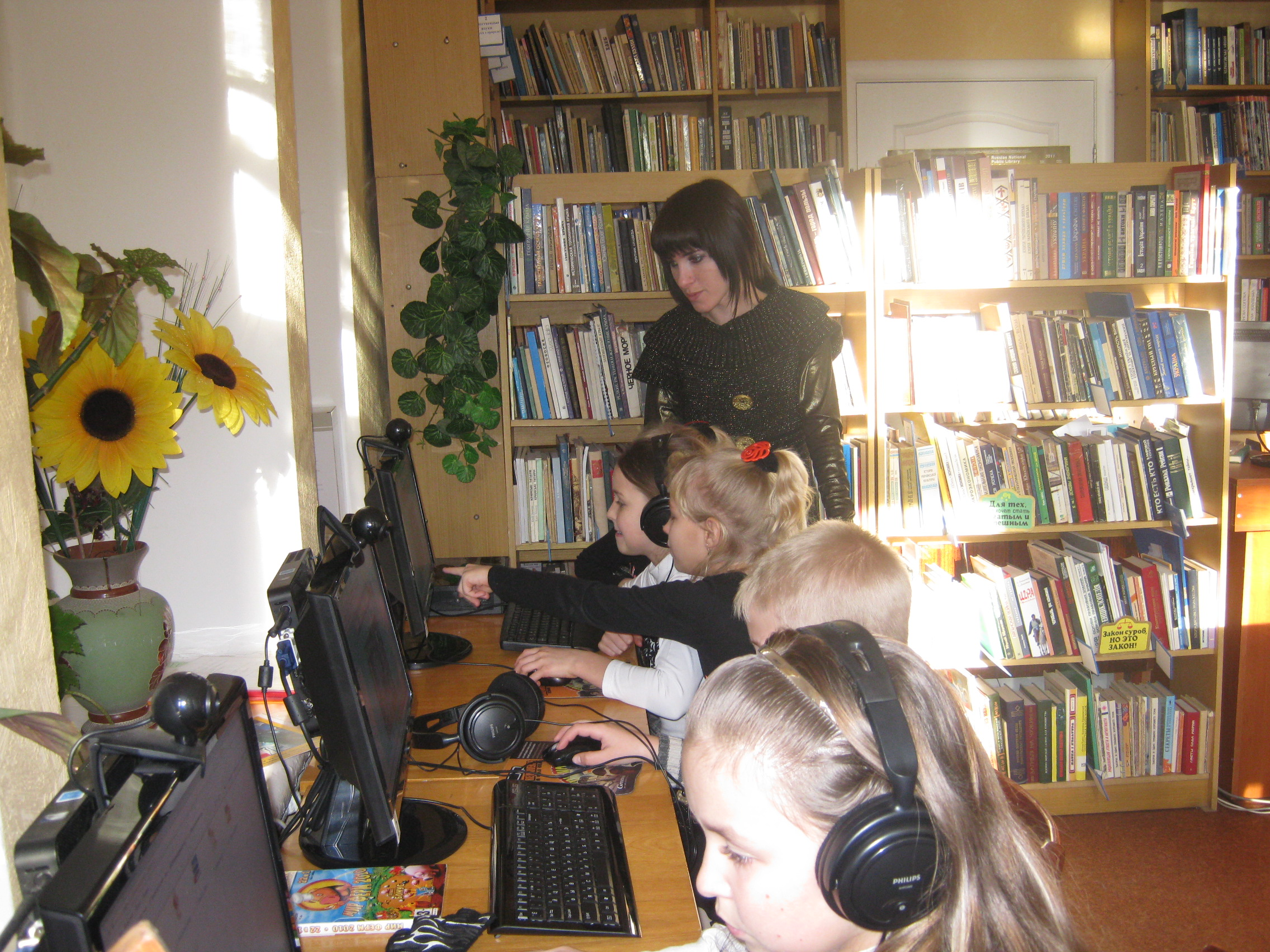 Интернет-центр в читальном зале библиотеки